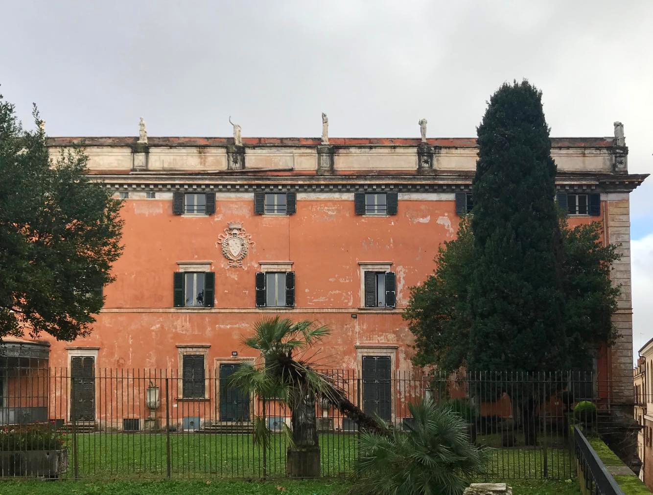 Palazzo di Villa Aldobrandini in Rome